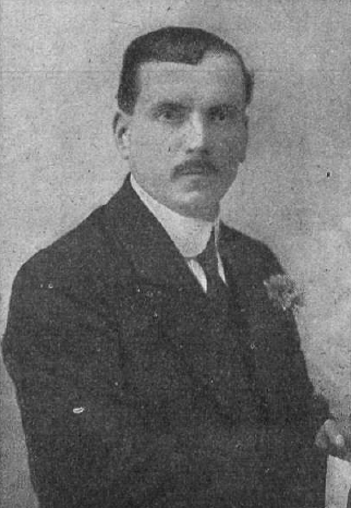 Fotografía del pintor español Enrique Romero de Torres publicada en 1913